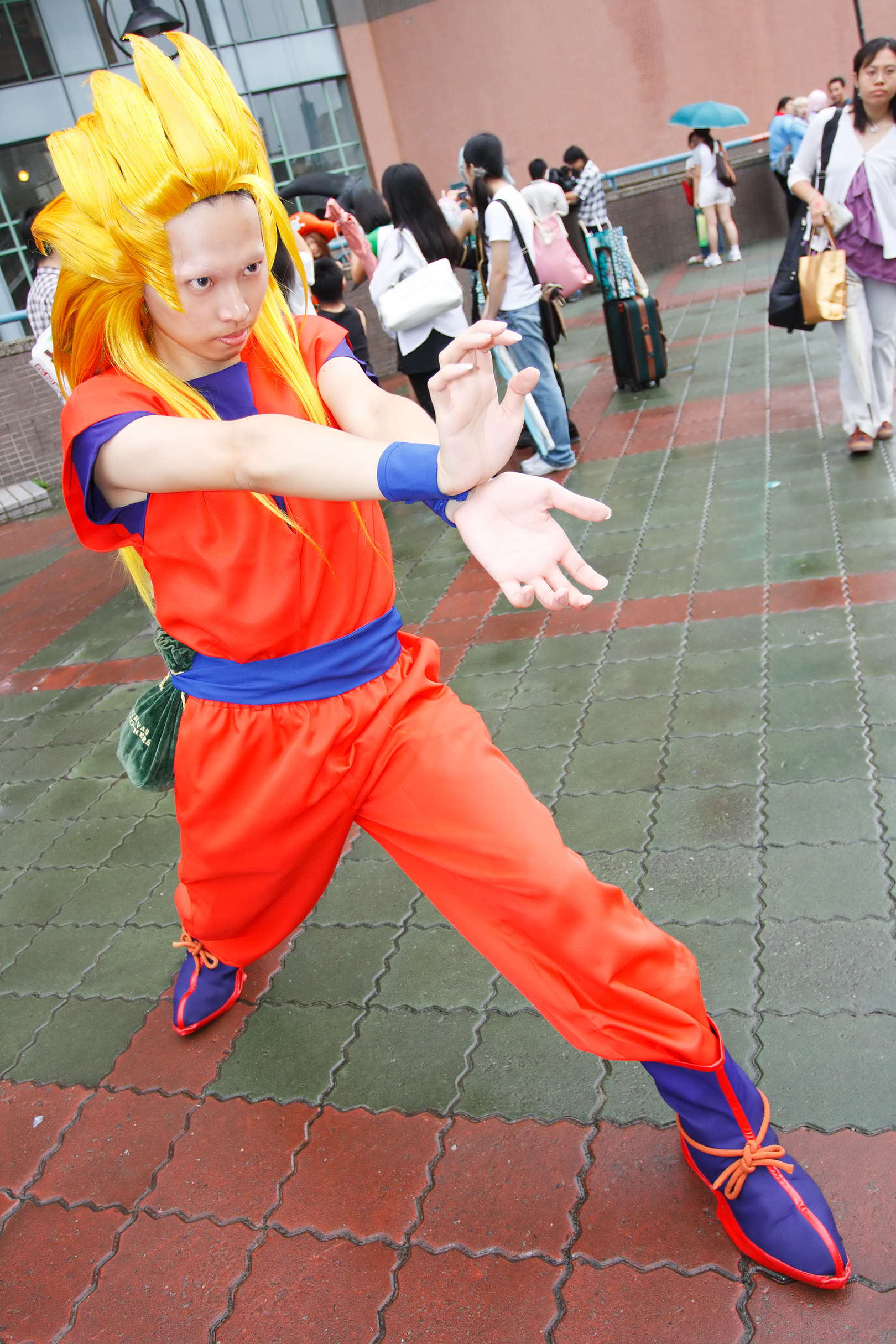 中文（台灣）: 第16屆台灣同人誌販售會，《七龍珠Z》超級賽亞人孫悟空cosplayer。